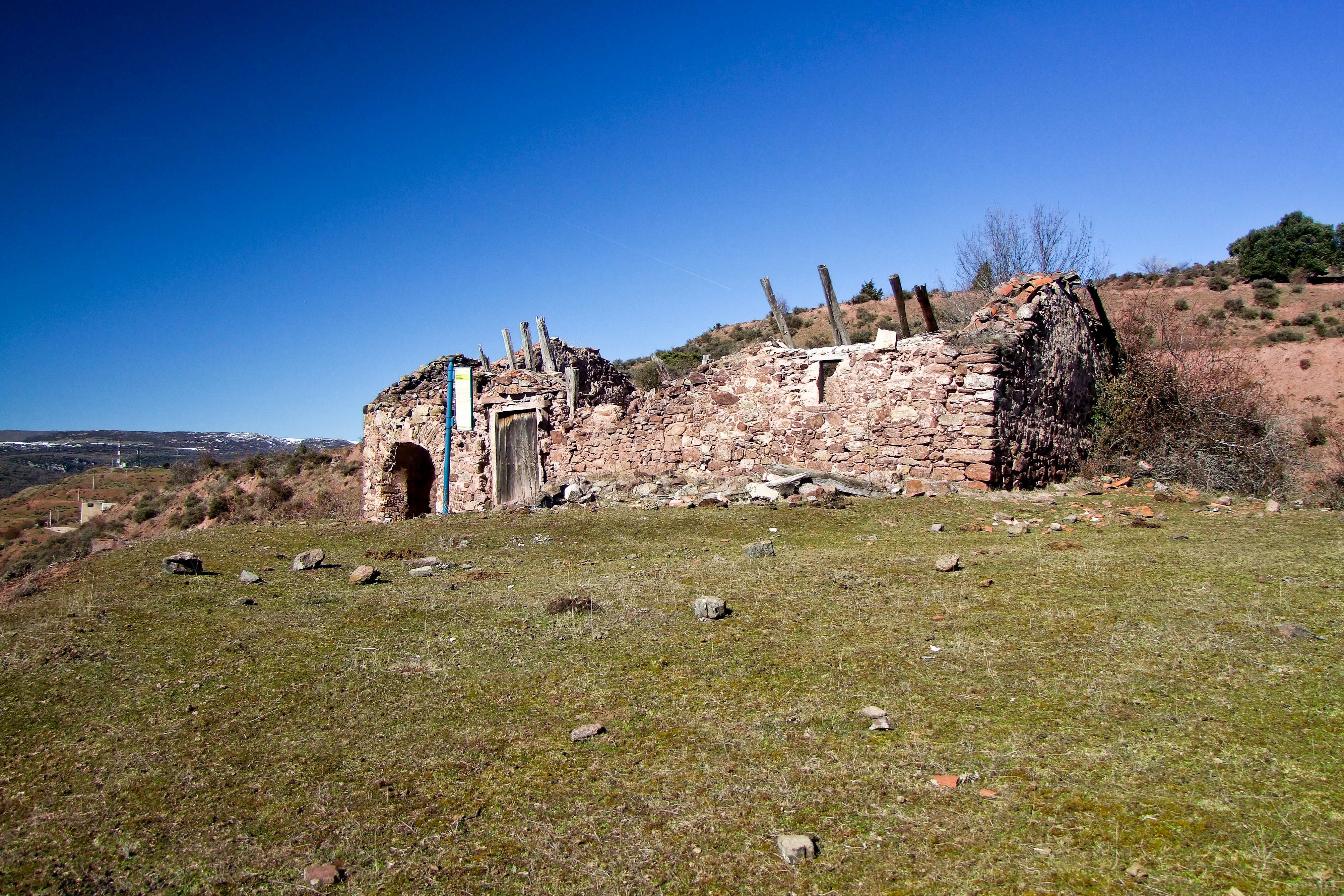 Ermita de San Roque en la localidad de Pinillos de Cameros, La Rioja - España